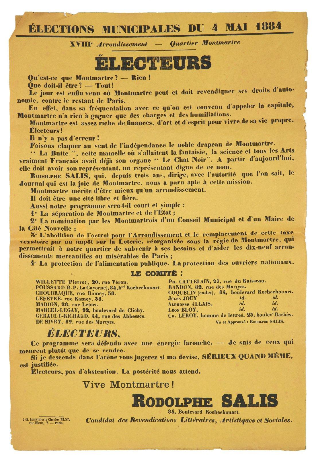 Poster